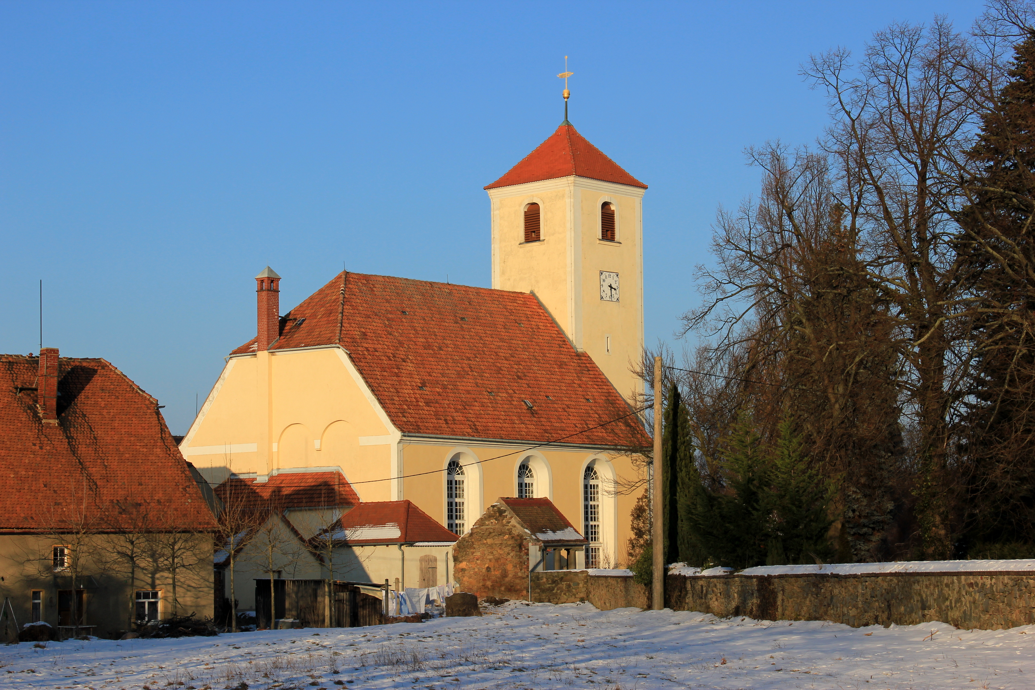 Hornjoserbsce: Ewangelska cyrkej w Poršicach.